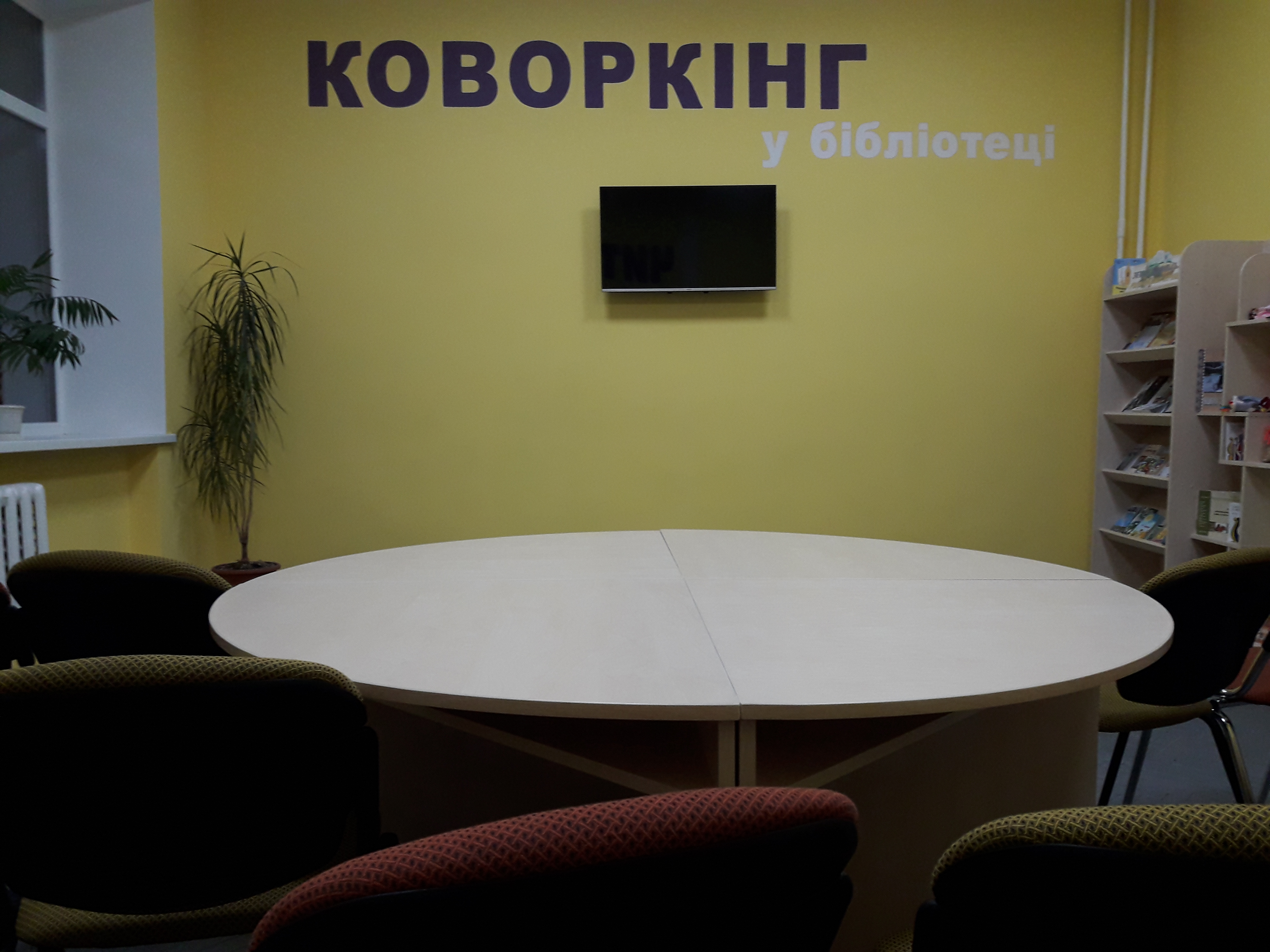 "Коворкінг у бібліотеці – вільний простір для творчості" - це окрема простора кімната де проходять майстер-класи, воркшопи, презентації, виставки, цікаві зустрічі з відомими людьми. А також обмін досвідом, який спонукає мешканців міста до самореалізації та творчості. Тут можна навчатись самому і навчати інших. Листопад 2019.